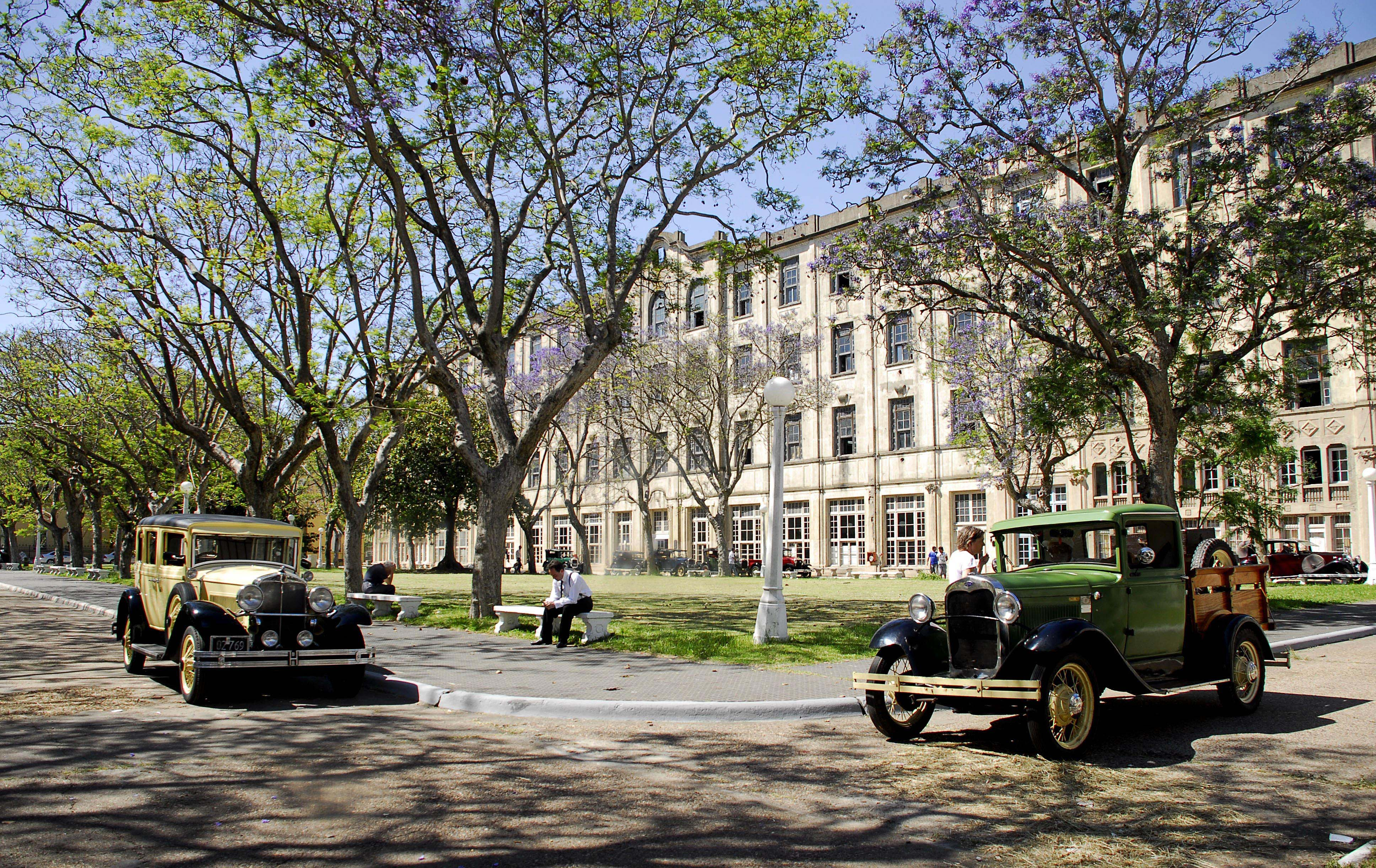 Ex Hotel de Inmigrantes